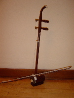 Erhu, instrument de musique chinois à deux cordes Auteur : Utilisateur:ElenaG, GFDL